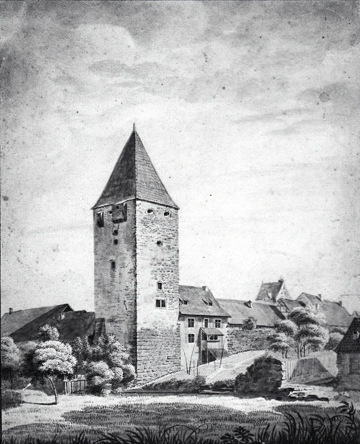 Diebsturm beim ehemaligen Stadtschloss in Schopfheim